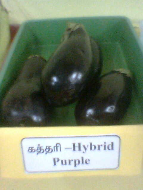 கலப்பினக் கத்தரிக்காய்